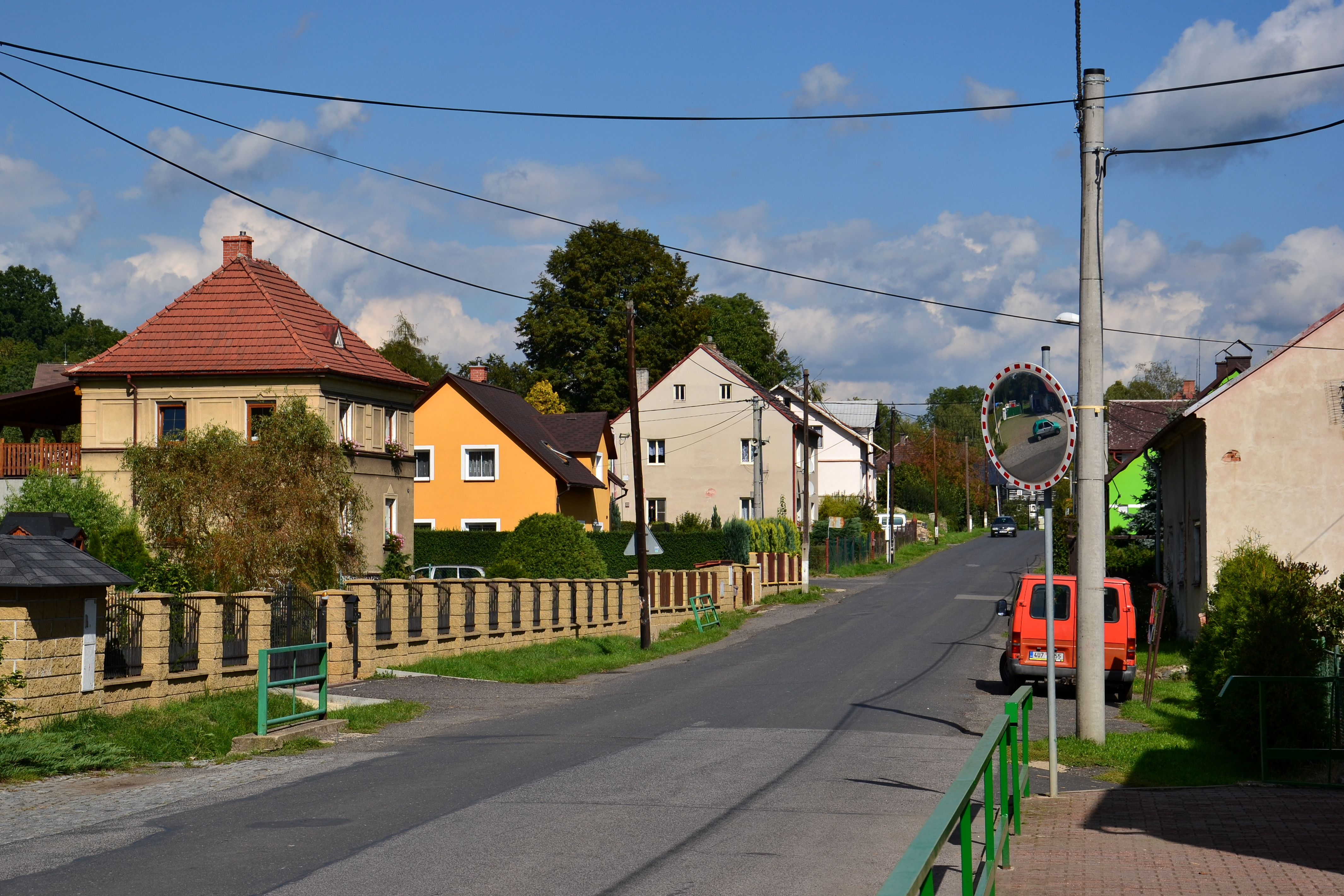 Ulice u obecního úřadu